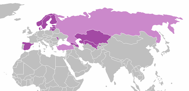 Présence modiale de TeliaSonera